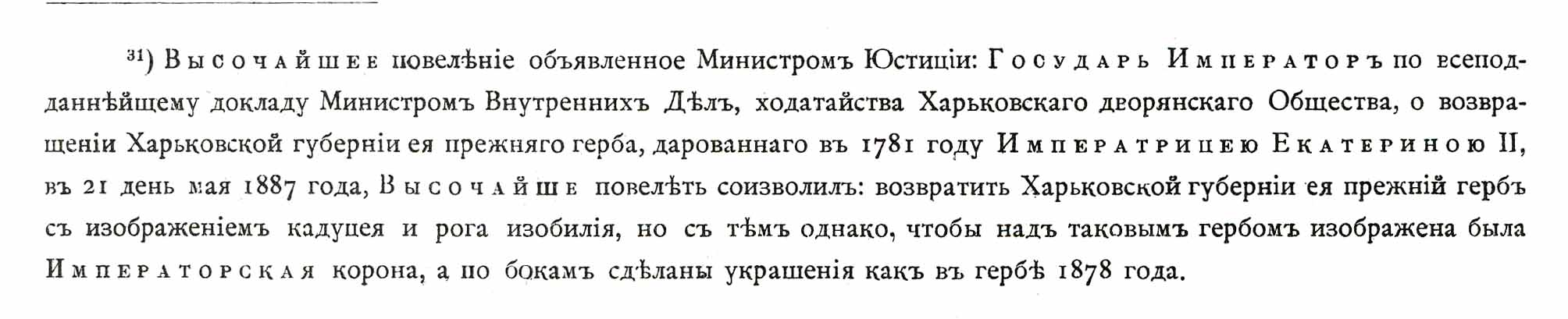 Kharkov Gubernia official herb 1887. Герба Харьковской губернии Высочайшее изменение (Александром Третьим). 1887 год. Гербовник Винклера.